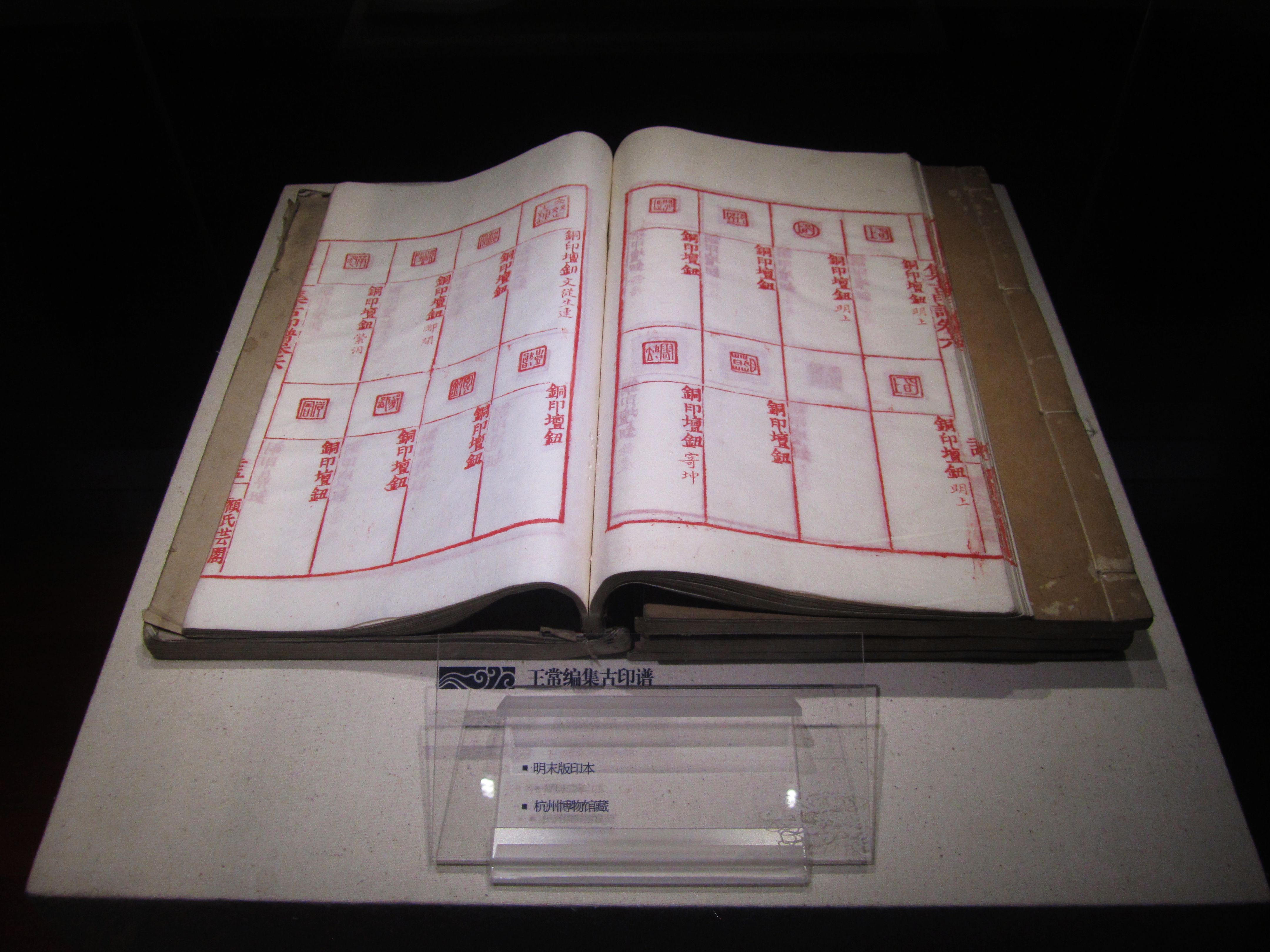 王常编集古印谱，明末版印本，杭州博物馆藏。